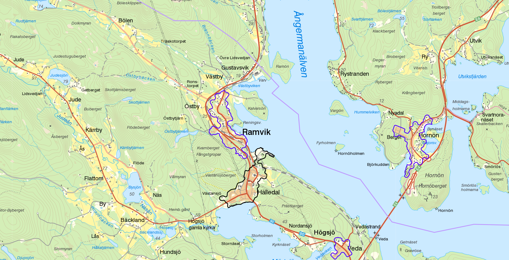 Tätorten Ramvik med gränserna från Statistiska centralbyråns tätortsavgränsning 2015 i svart och gränserna från småortsavgränsningen 2015 i lila. Bakgrundskarta från Lantmäteriet, skala 1:30 236.